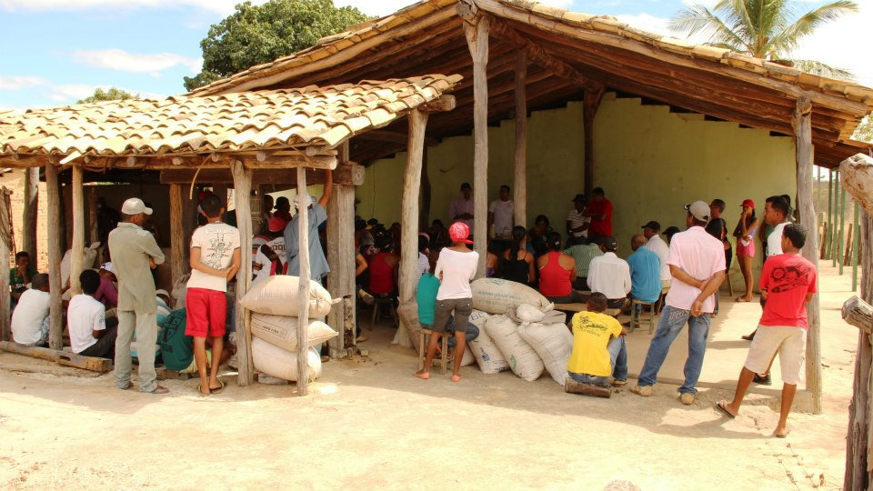 Pessoas reunidas em casa num povoado de Paratinga, Bahia, em 2014.